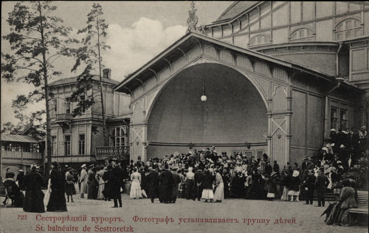 Сестрорецкий курзал